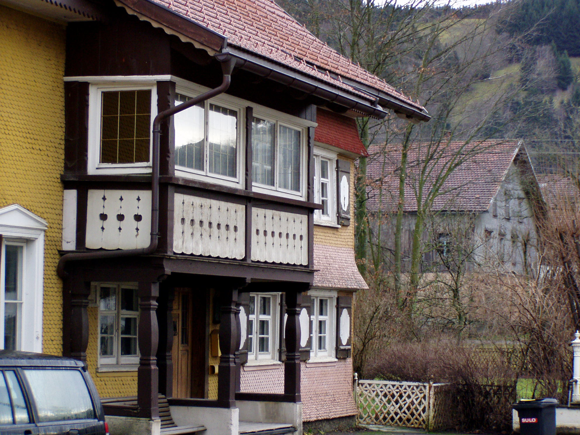 Gestratzer Str. 2 in Grünenbach